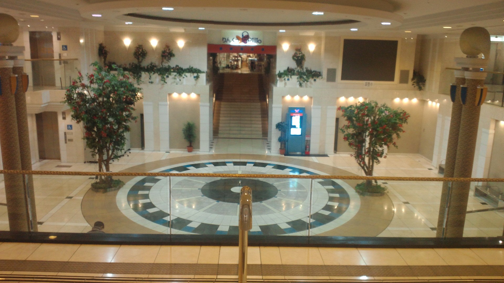 りんくうPapillio構内星の広場